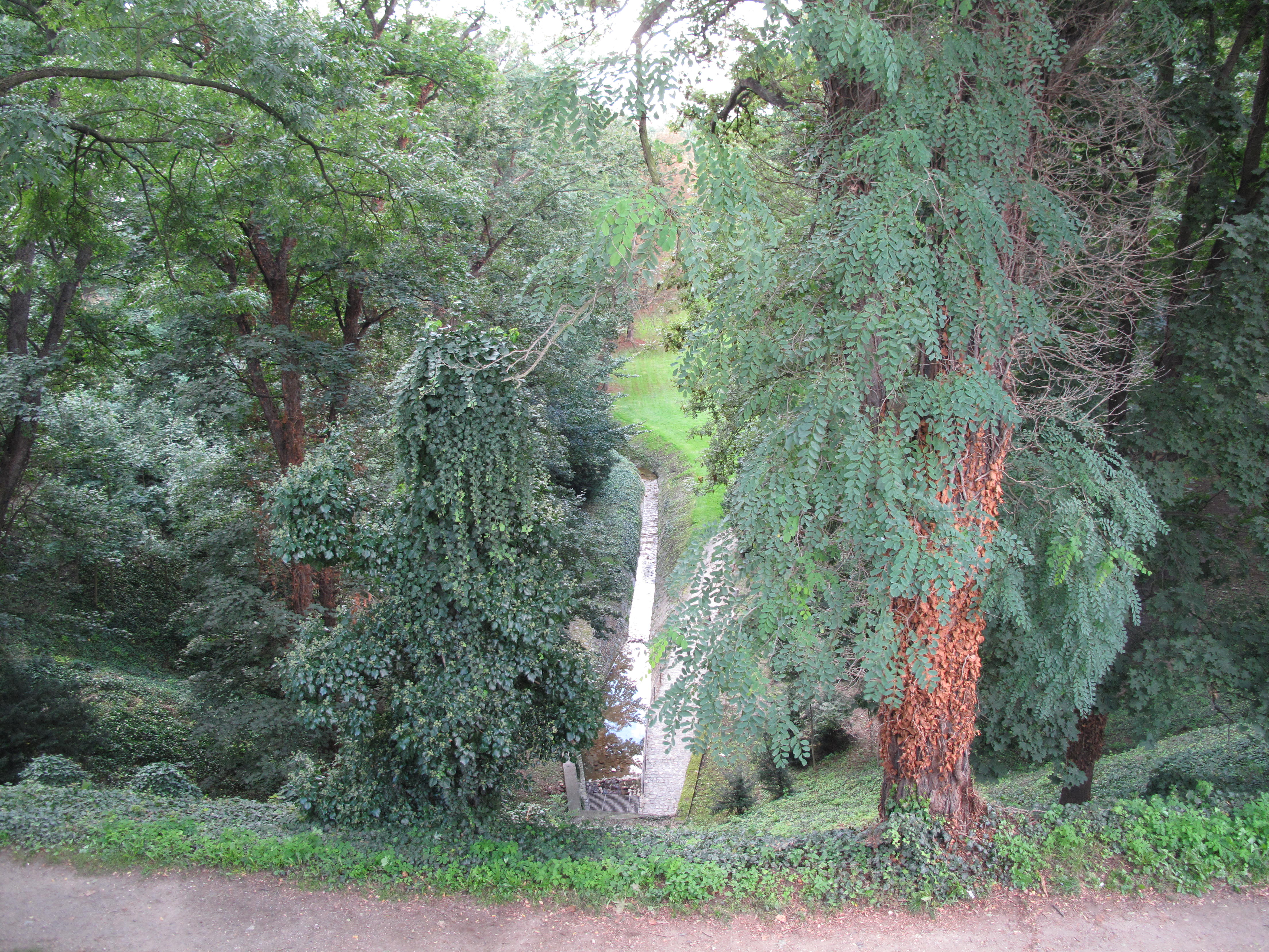 Pražský hrad, Horní Jelení příkop, přítok Brusnice do pěšího tunelu pod Prašným mostem